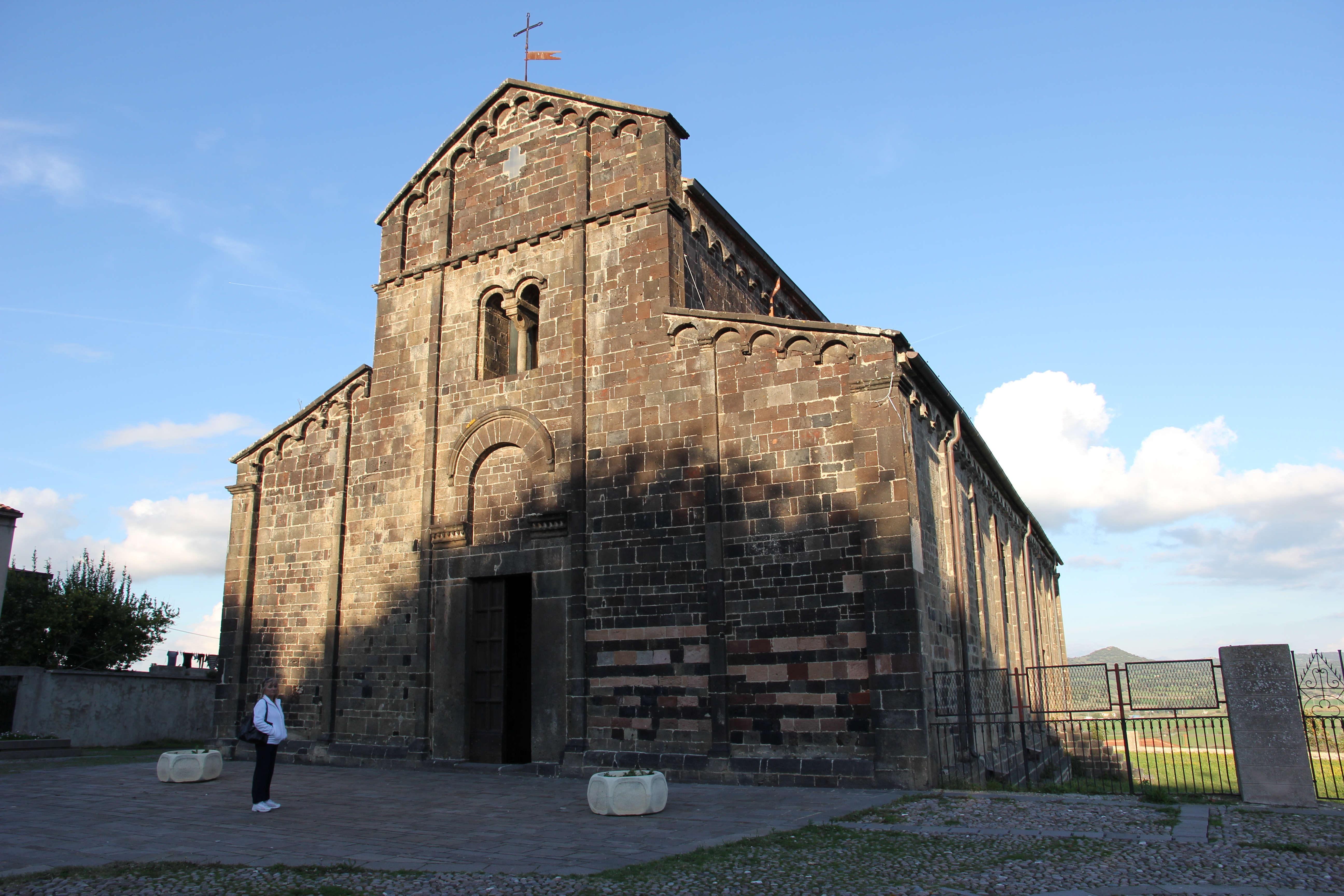 Ardara - Chiesa di Santa Maria del Regno